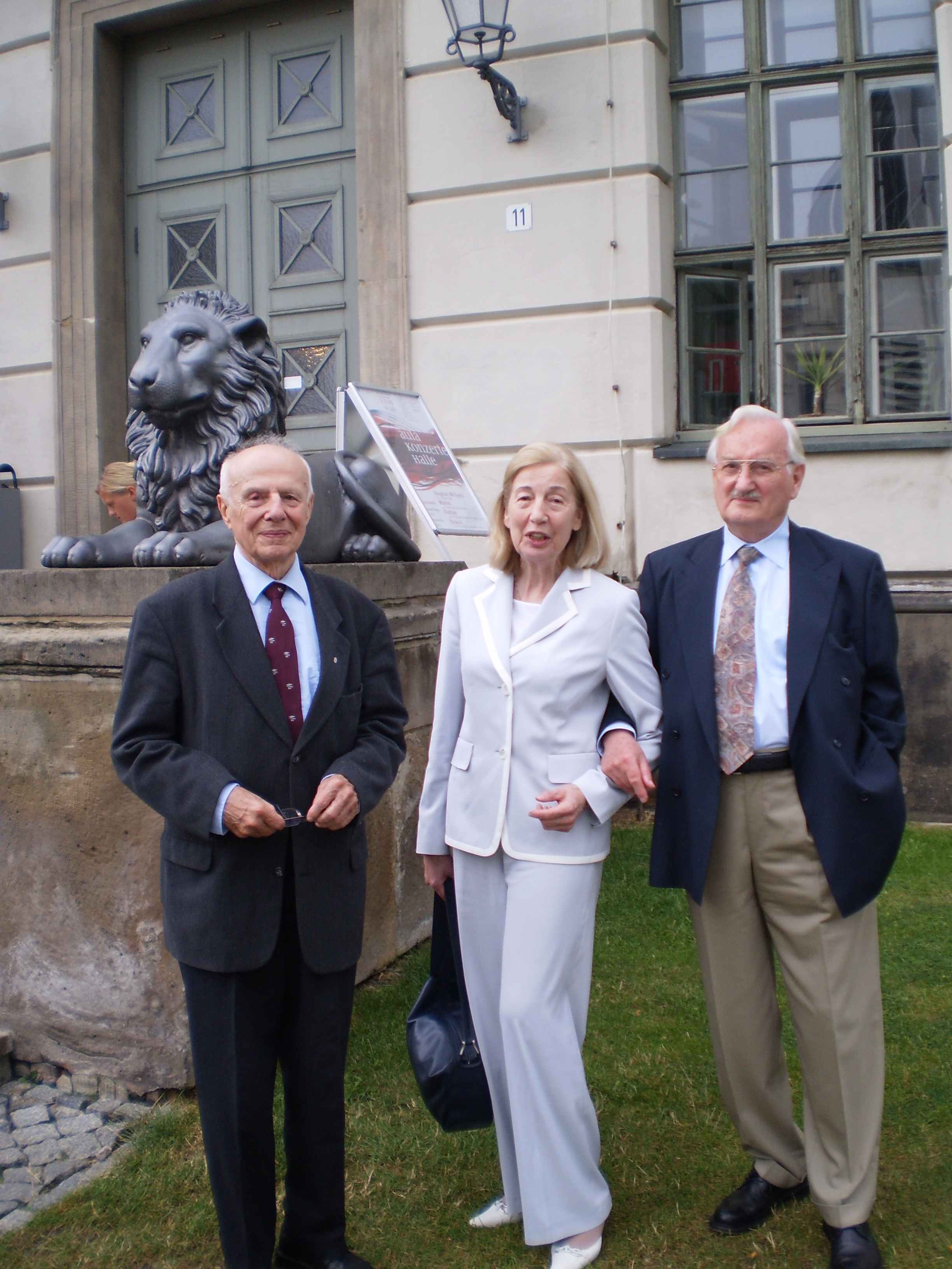 General a. D. Dr. rer. pol. Günter Kießling, die Kinderärztin Dr. med. Eveline Demuth und Generalarzt a. D. Dr. med. Horst Hennig vor dem Hauptgebäude der Universität Halle.